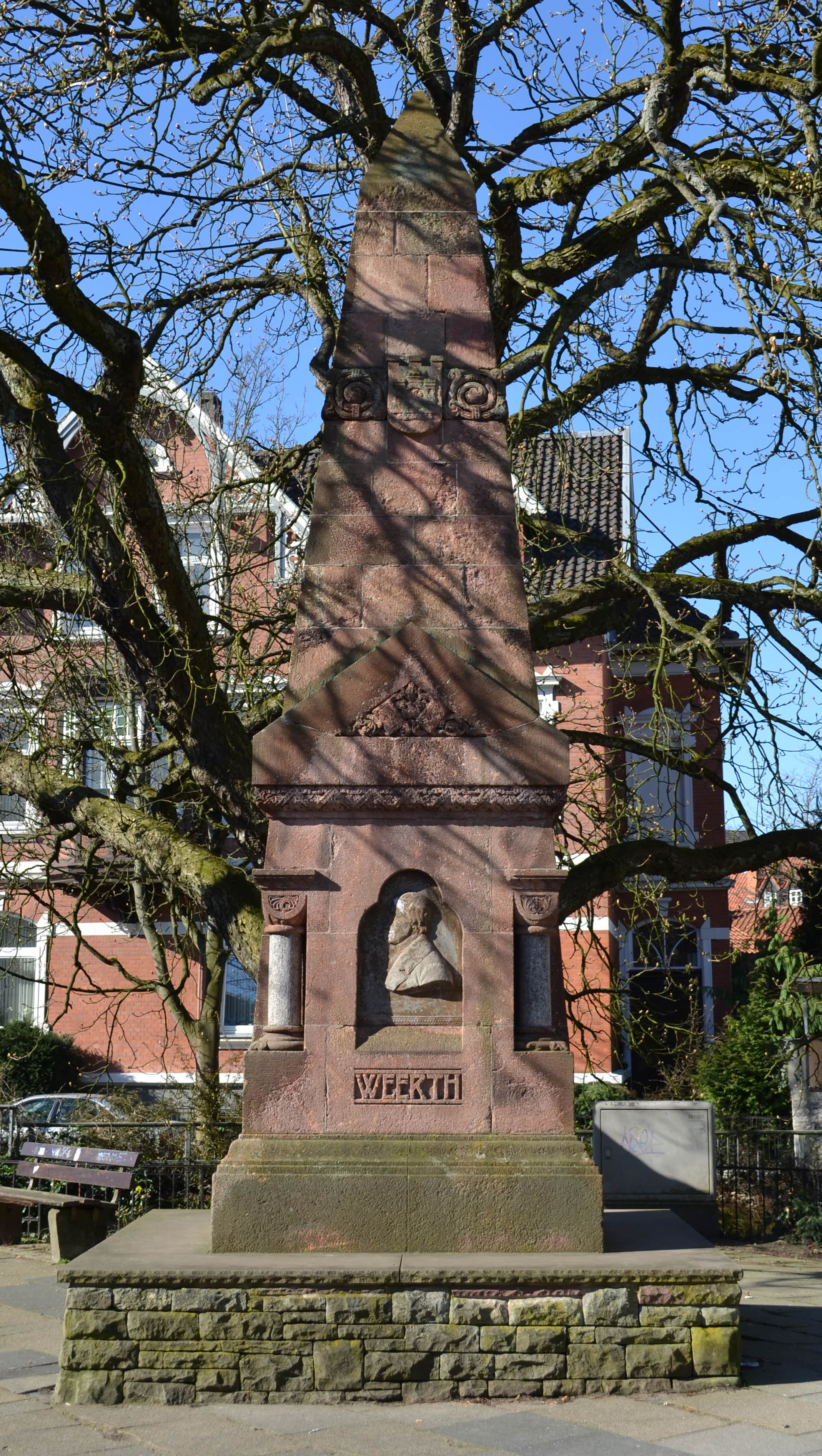 Baudenkmal Detmold Nr. 439 - Ferdinand-Weerth-Denkmal 1901 Weerthplatz